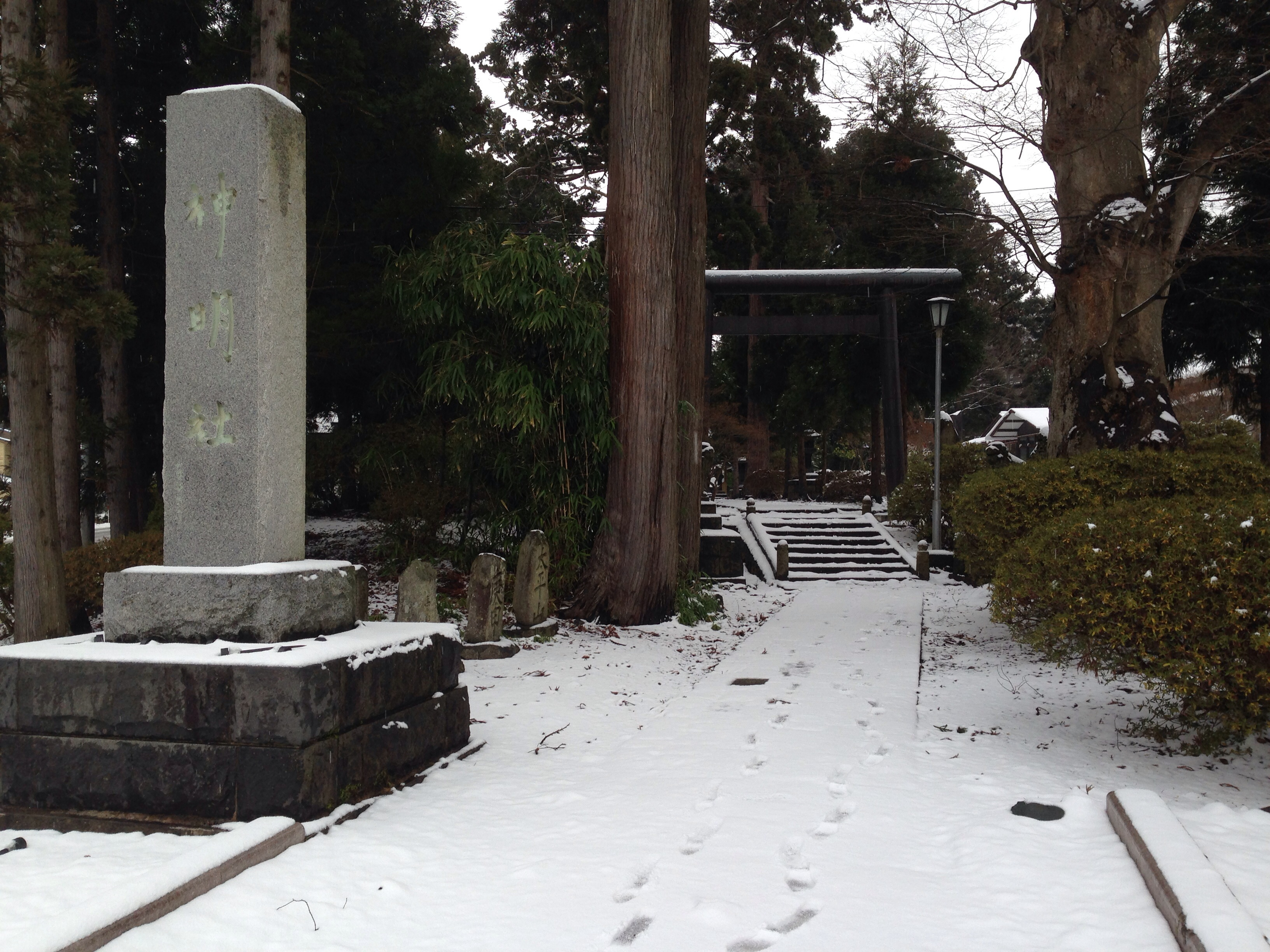 秋田県南秋田郡五城目町の神明社（社標）。